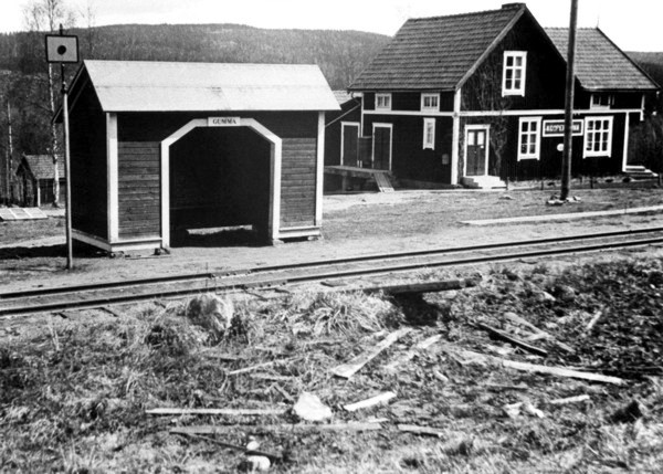 Gumma hållplats på Nordmark-Klarälvens Järnväg.